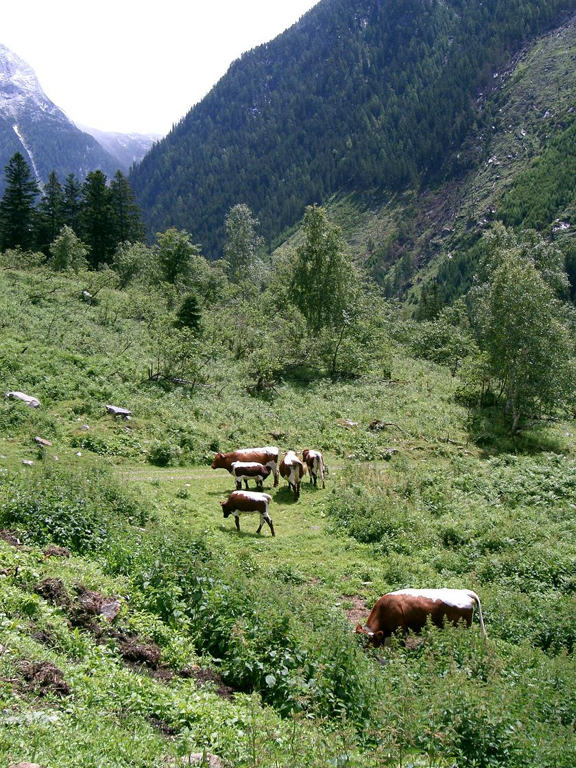 Beschreibung: Eine Herde Pinzgauer Rinder in den Hohen Tauern Fotografiert im Juli 2004 Fotograf: Rumo